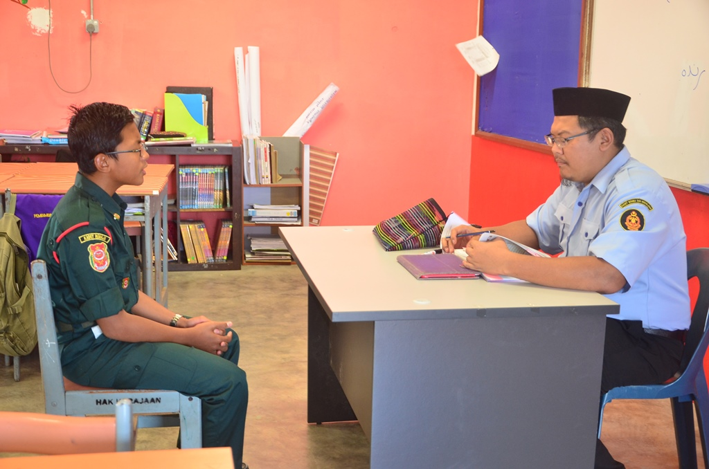 Thaqeef, salah seorang peserta hafazan lelaki kategori menengah rendah bagi Pertandingan MTQ Peringkat Sekolah sedang ditasmik oleh Ustaz Hanif pada 17 Febuari 2016 di kelas 4 Jannatul Adnin.